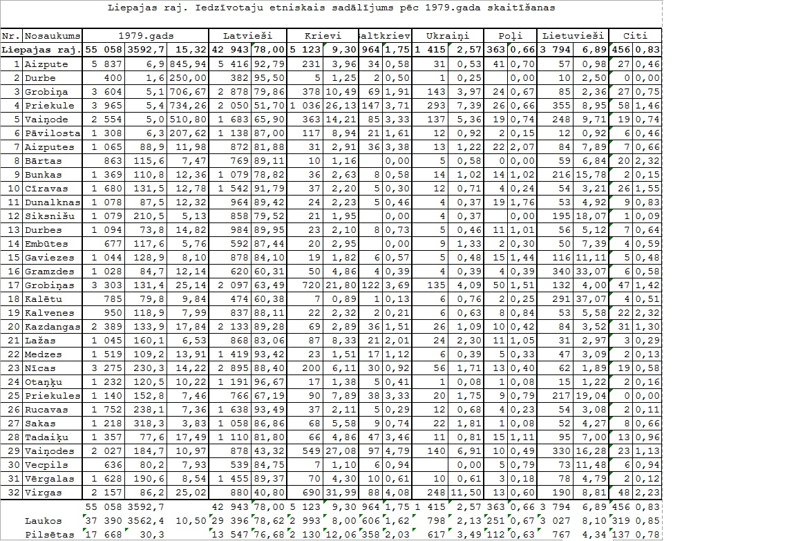 Latvijas 1979. gada tautas skaitīšanas dati